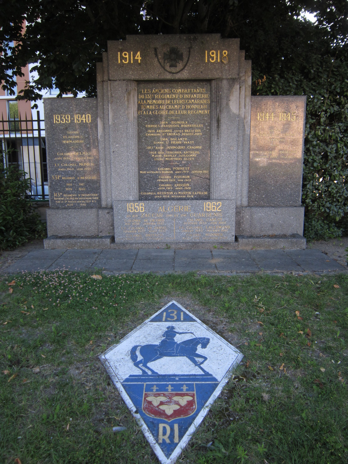 Monument commémoratif 131e Régiment d'Infanterie, situé ancienne caserne Coligny à Orléans